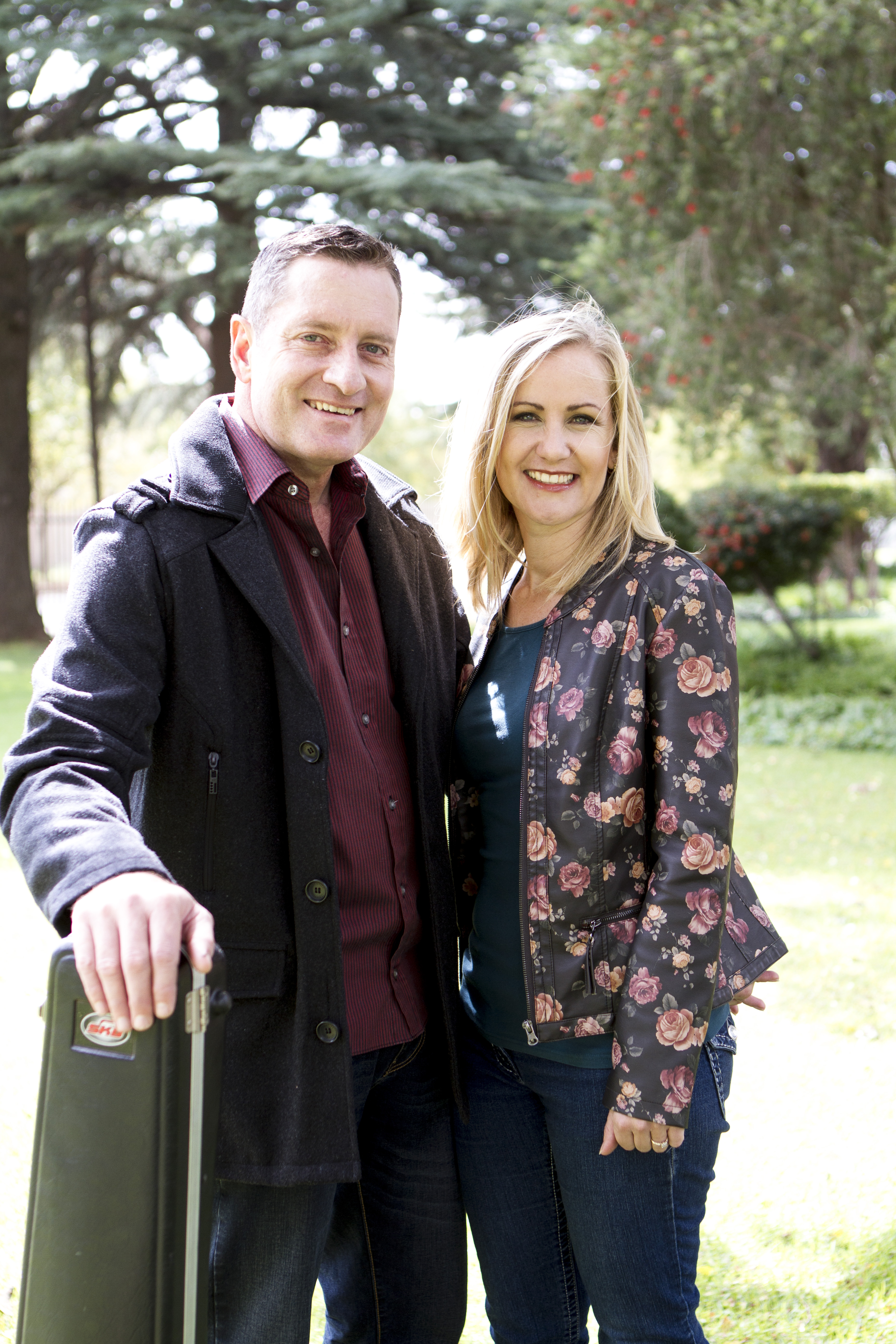 Dr Ben was voorheen van NG Eldoraigne, NG Proteapark in Rustenburg voor hy leraar by NG Delmas Moedergemeente was. Hy is einde 2016 beroep na NG Grootkerk in Graaff Reinet. Hy is getroud met Sanet wat saam met hom dien.